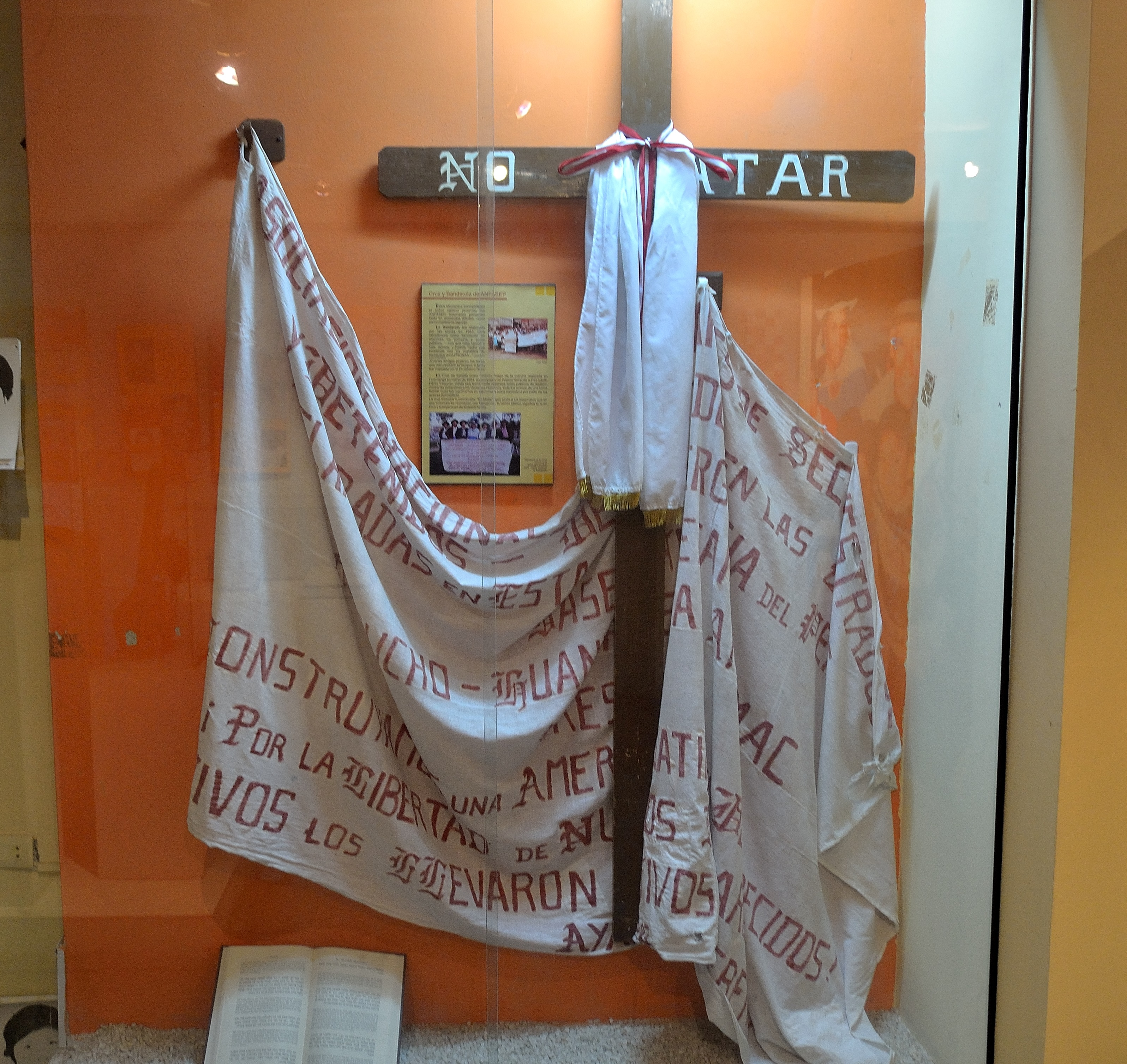 atatu